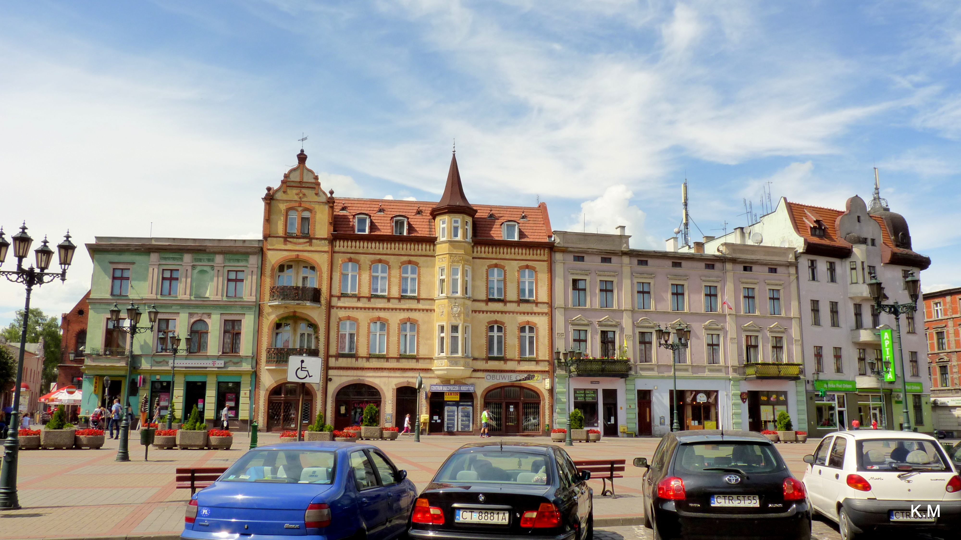 Chełmża - Rynek